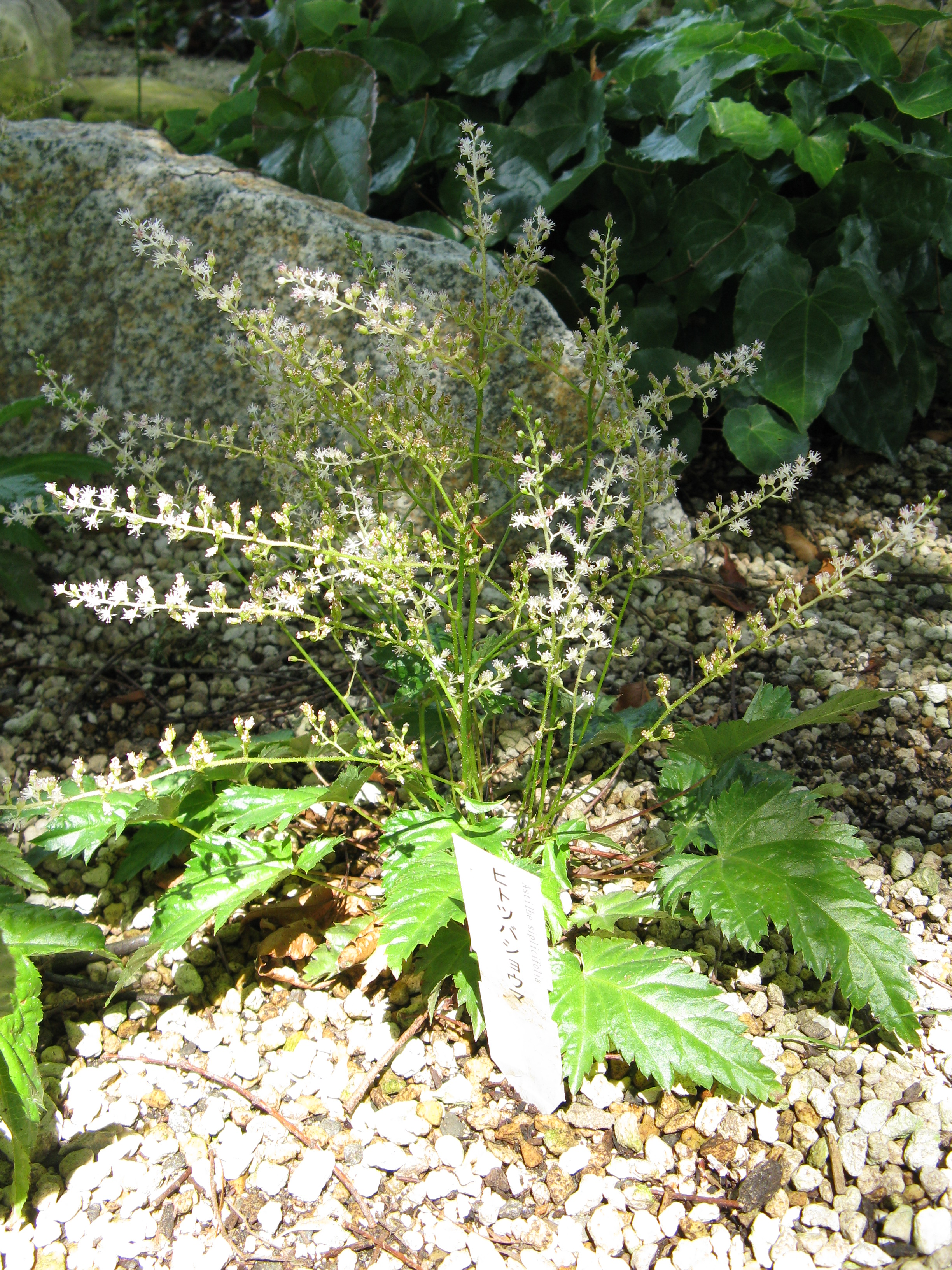 Scientific name Astilbe simplicifolia